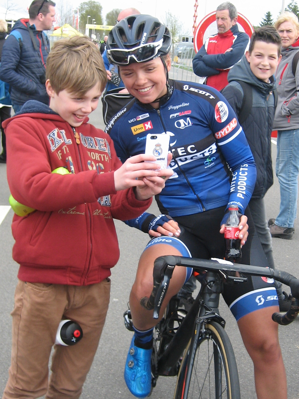 Na de finish van de Amstel Gold Race Ladies Edition 2017.